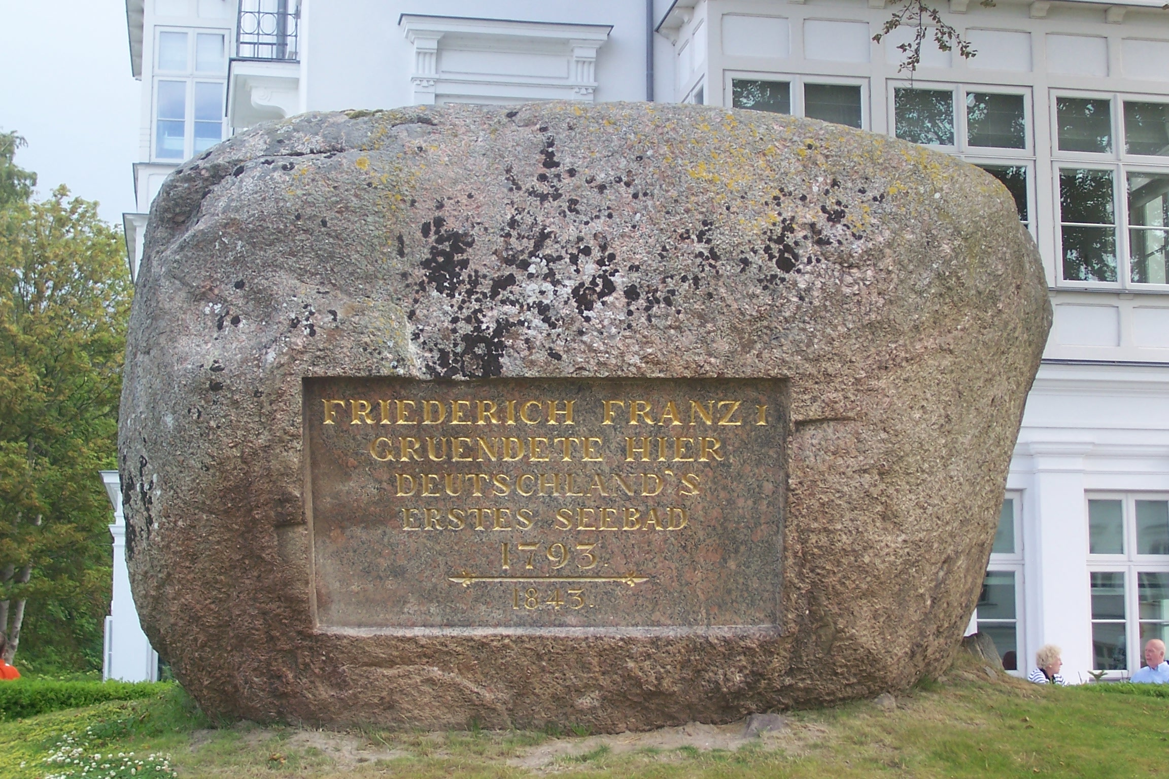 Inschrift zur Gründung Heiligendamms